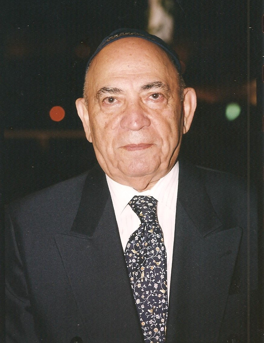 ראובן קשאני 2003